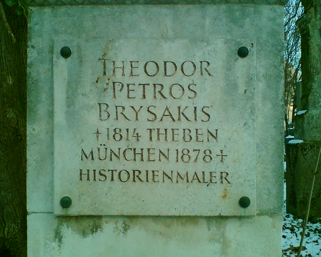 Grabstein des griechischen Malers Theodoros_Vryzakis in München